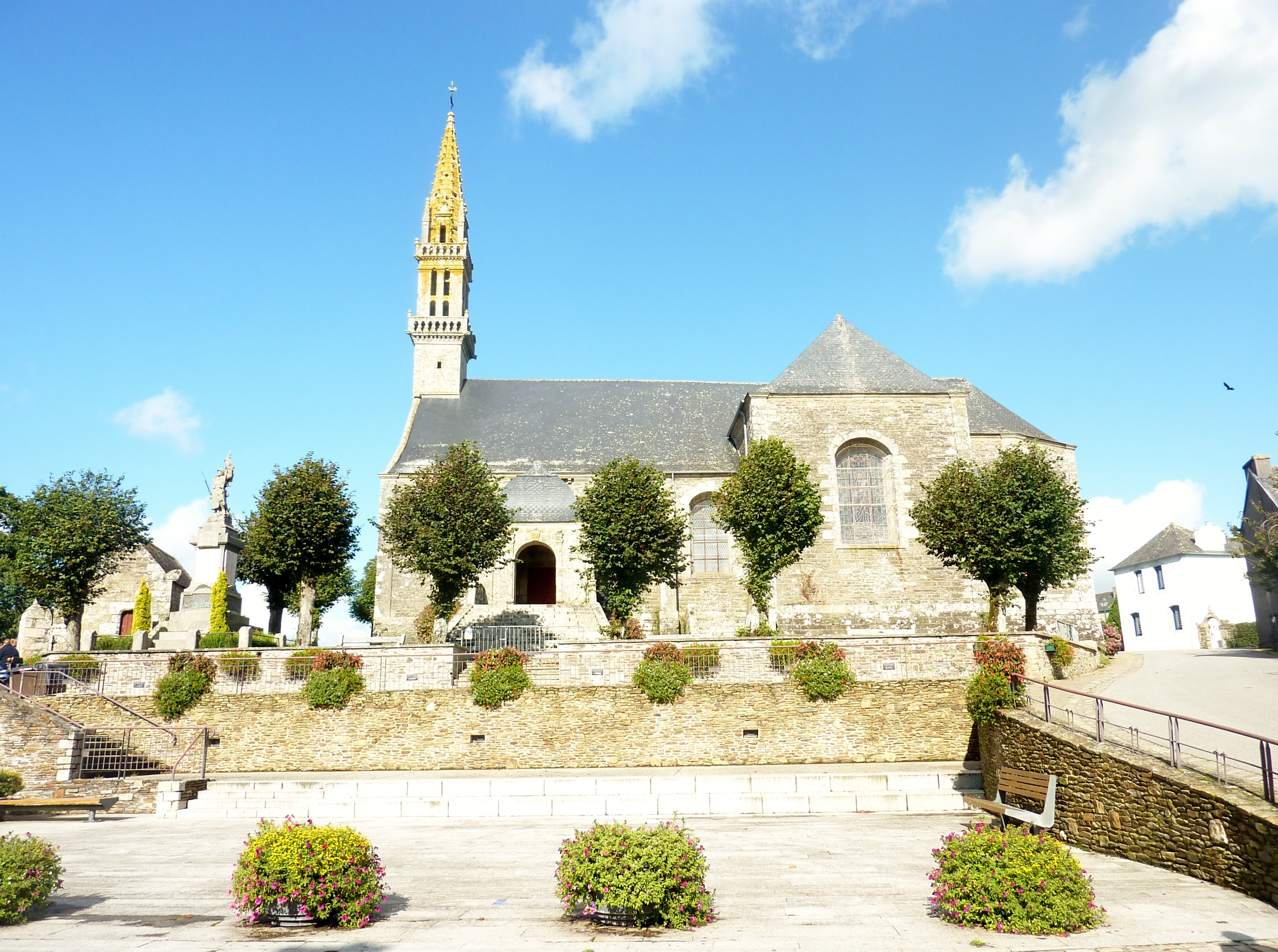 Spézet : léglise paroissiale Saint-Pierre, vue d'ensemble depuis le sud